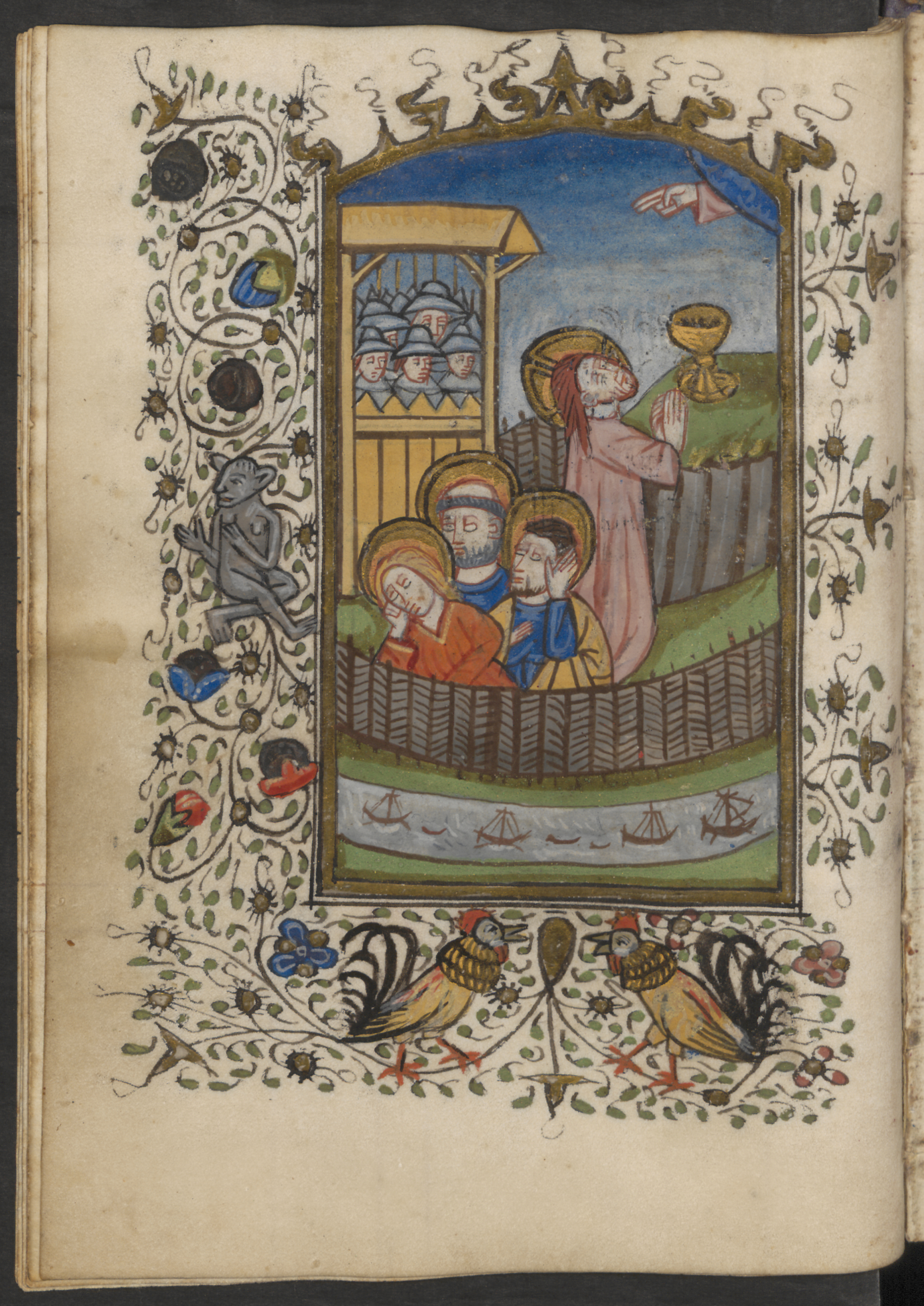 Hs. 5 J 27, f. 15v.Christ on the Mount of Olives